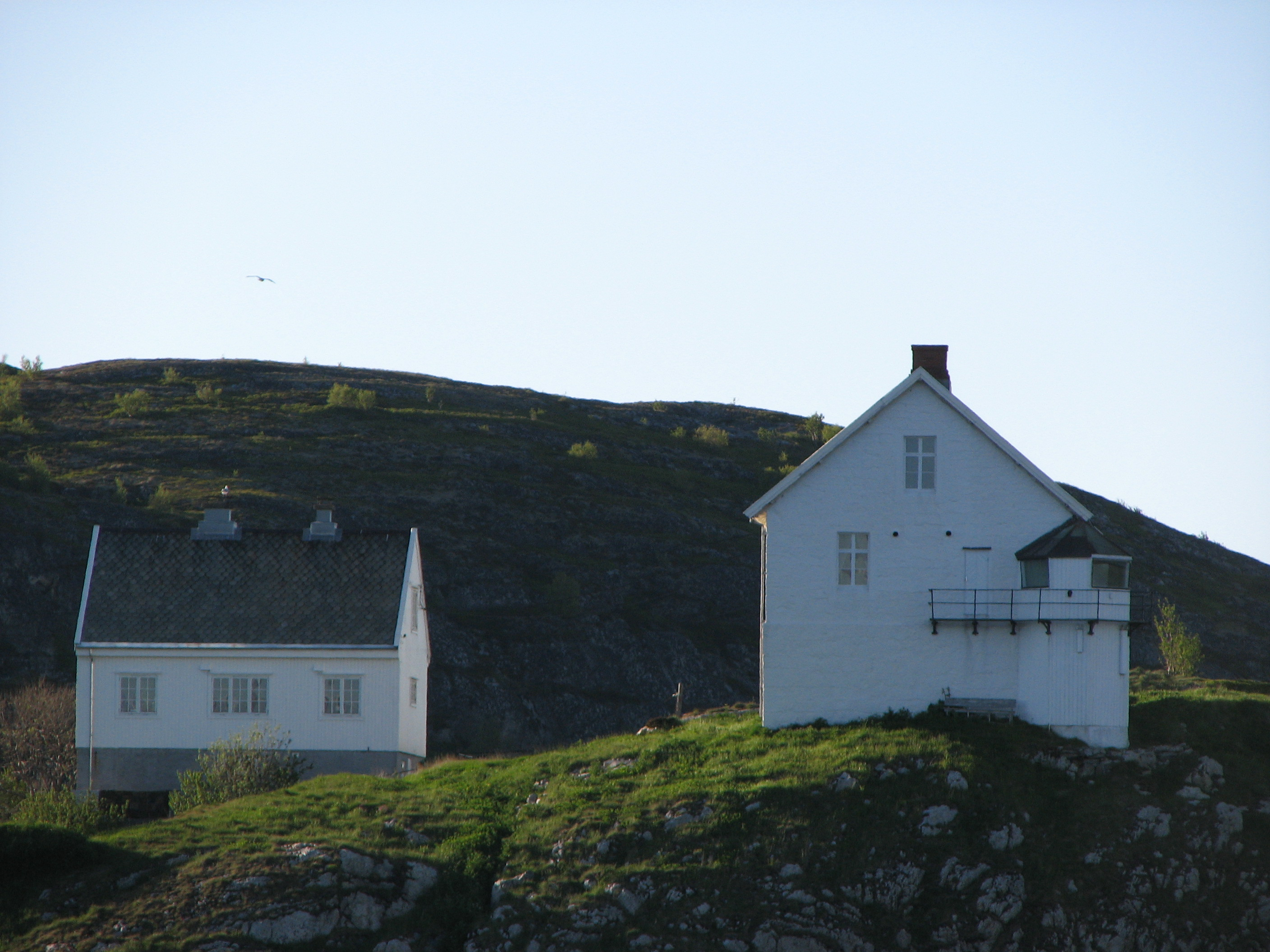 Nyholmen fyr, Bodø